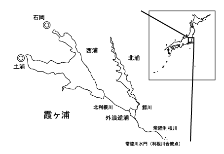 霞ヶ浦の各水域（西浦・北浦・外浪逆浦・北利根川・鰐川・常陸利根川）。なお、西浦のうち、土浦市方面に伸びる湾を「土浦入り（つちうらいり）」、石岡市方面に伸びる湾を「高浜入り（たかはまいり）」、この両者が交差する場所を「三叉沖（みつまたおき）」と呼ぶ。利根川との合流地点には常陸川水門がある。投稿者作成。